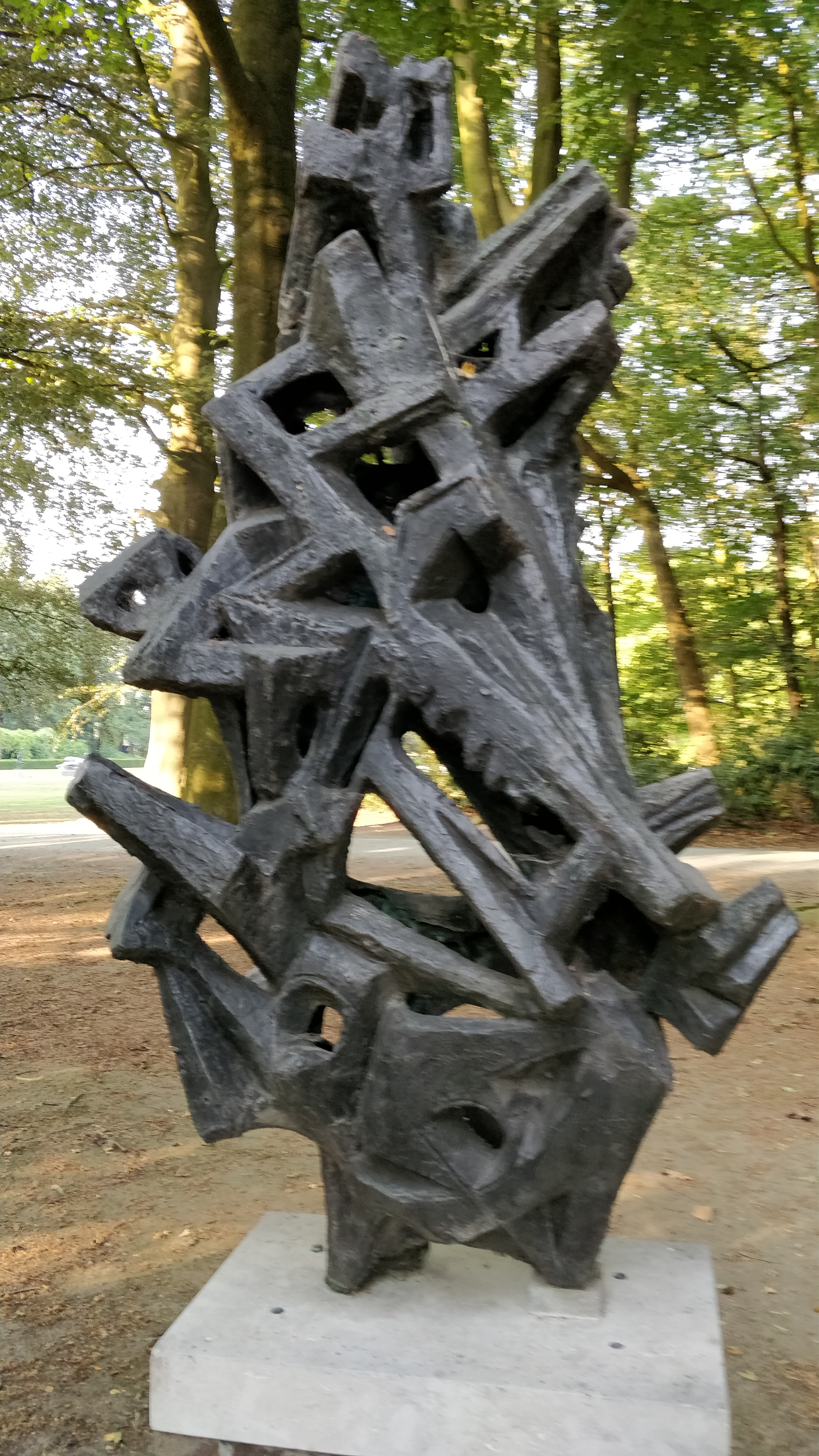 De Boodschap, Umberto Mastroianni, Middelheimmuseum